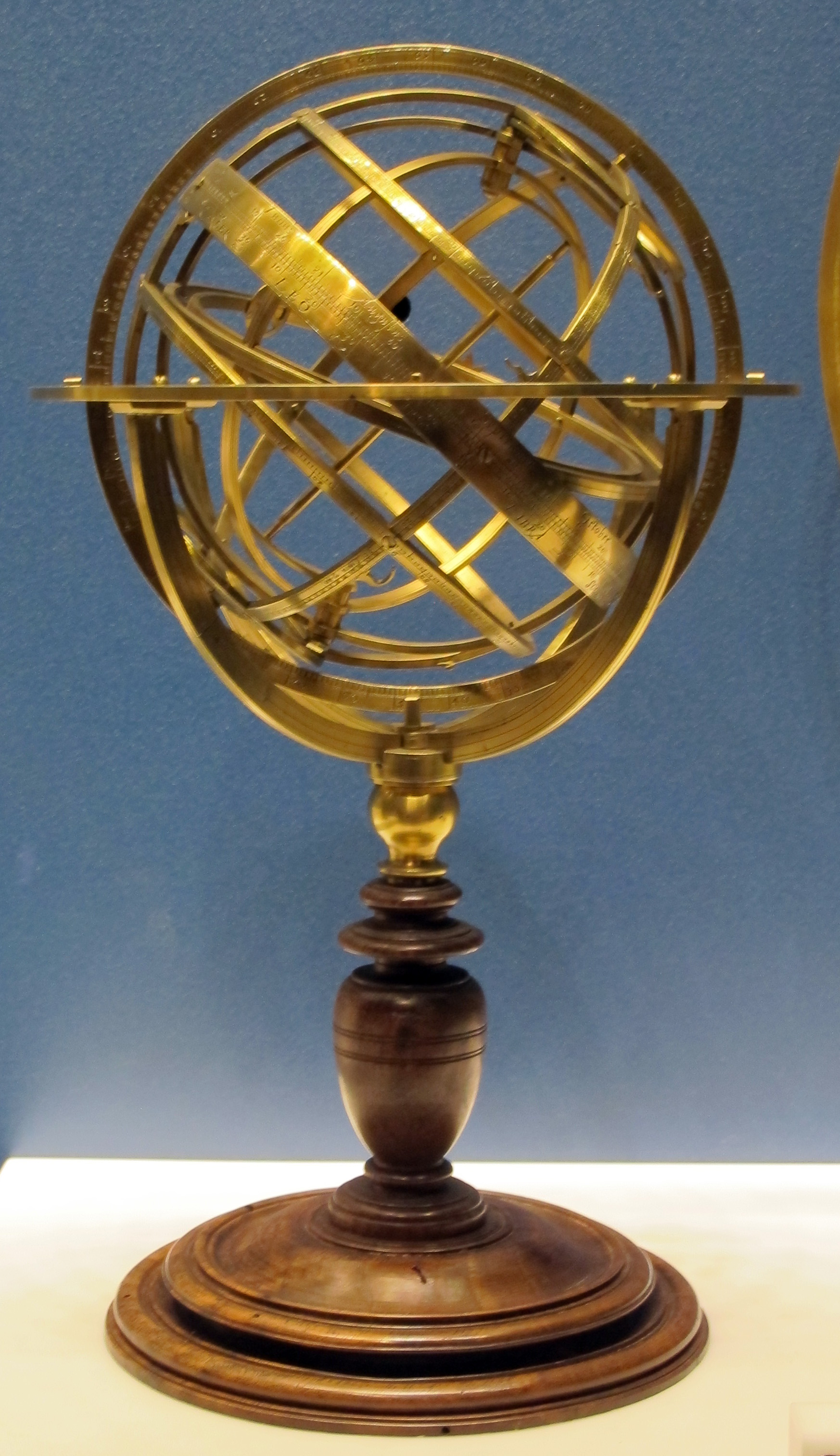 Museo Galileo, Firenze